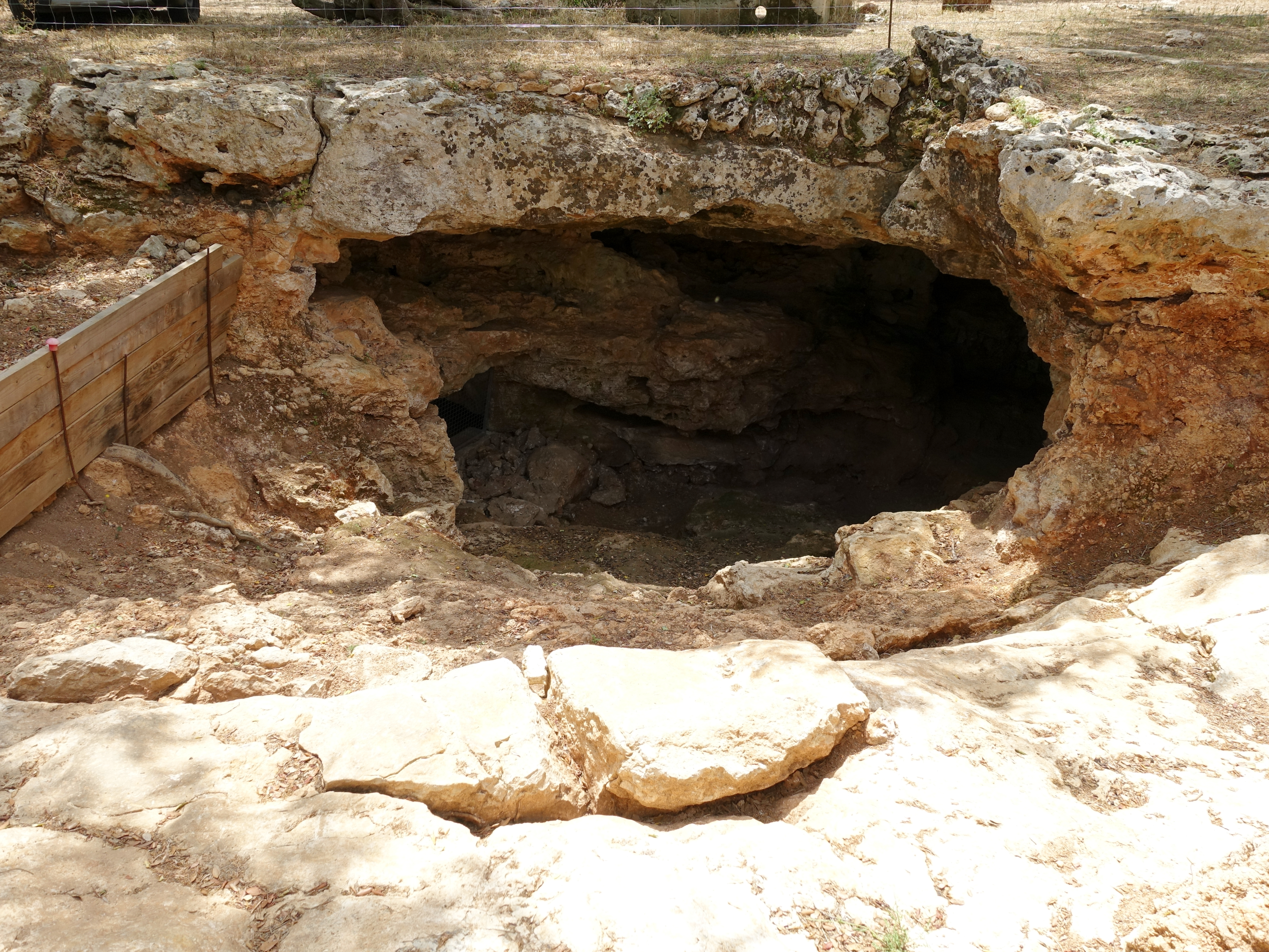 Cova del Camp del Bisbe, Gemeinde Sencelles, Mallorca, Spanien